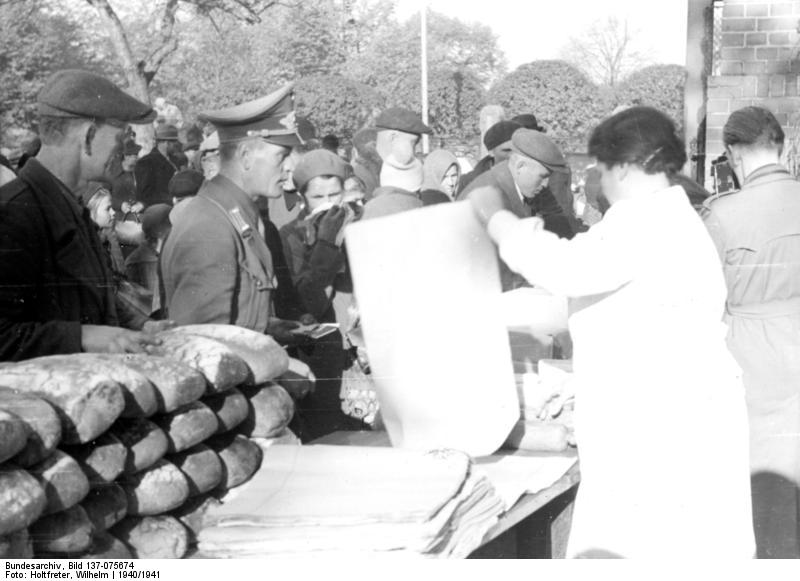 Polen, Betreuung von Umsiedlern Cholmer Umsiedlung: Lebensmittelausgabe im Lager 1940/41 [Polen.- Ausgabe von Lebensmitteln an deutschstämmige Umsiedler.]